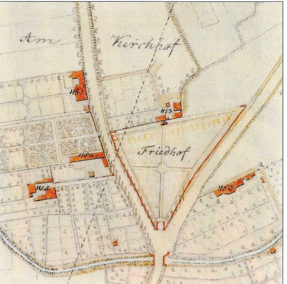 Der älteste Teil des Alten Friedhofs in Bonn - Ausschnitt aus dem Plan der Stadt Bonn von 1819